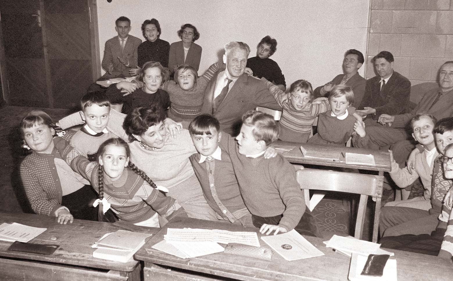 Glasbena ura na VI. osnovni šoli po funkcionalno glasbeni metodi prof. Elly Bašićeve.